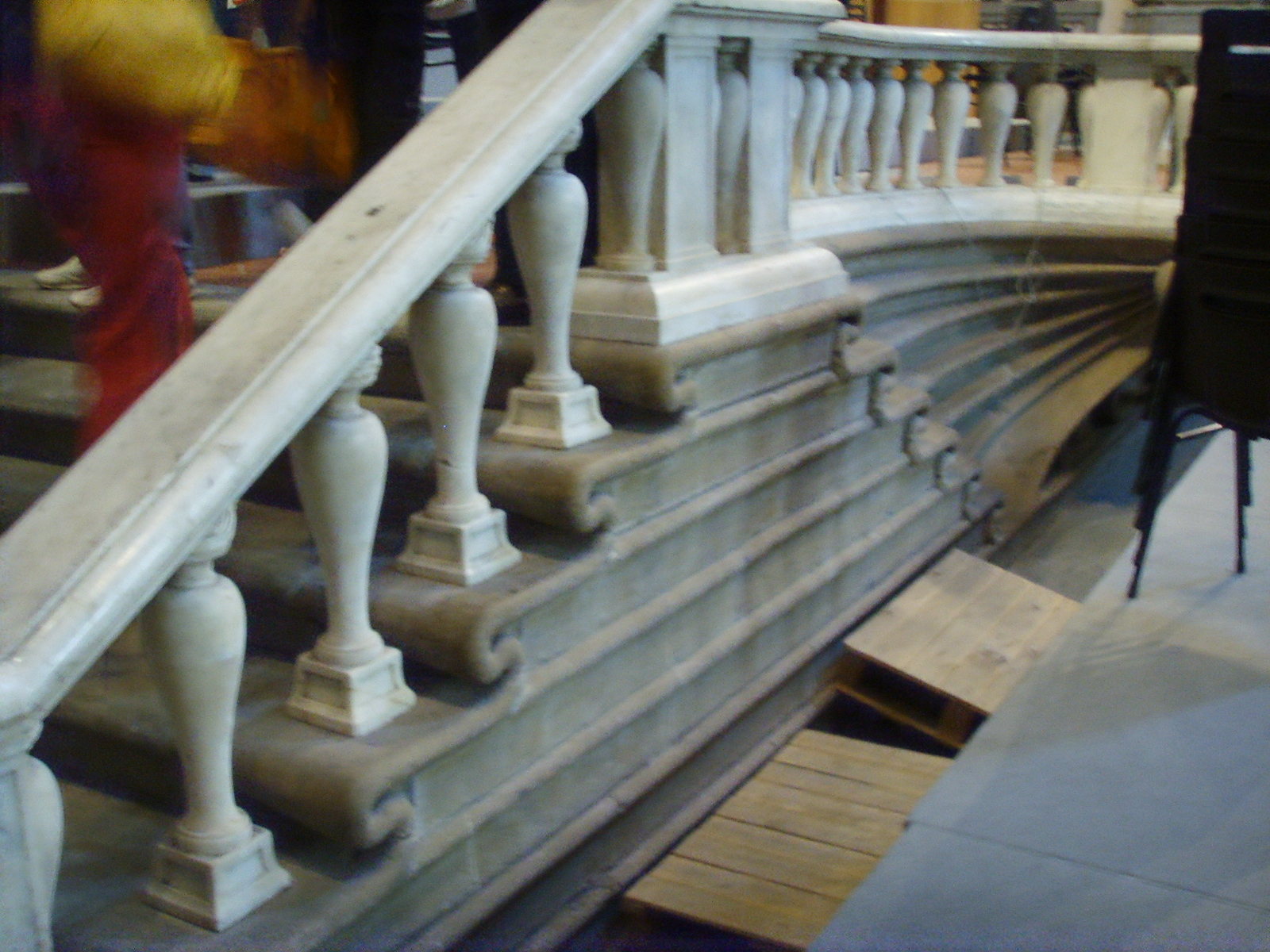 Santo Stefano al Ponte, scalinata del buontalenti, dettaglio